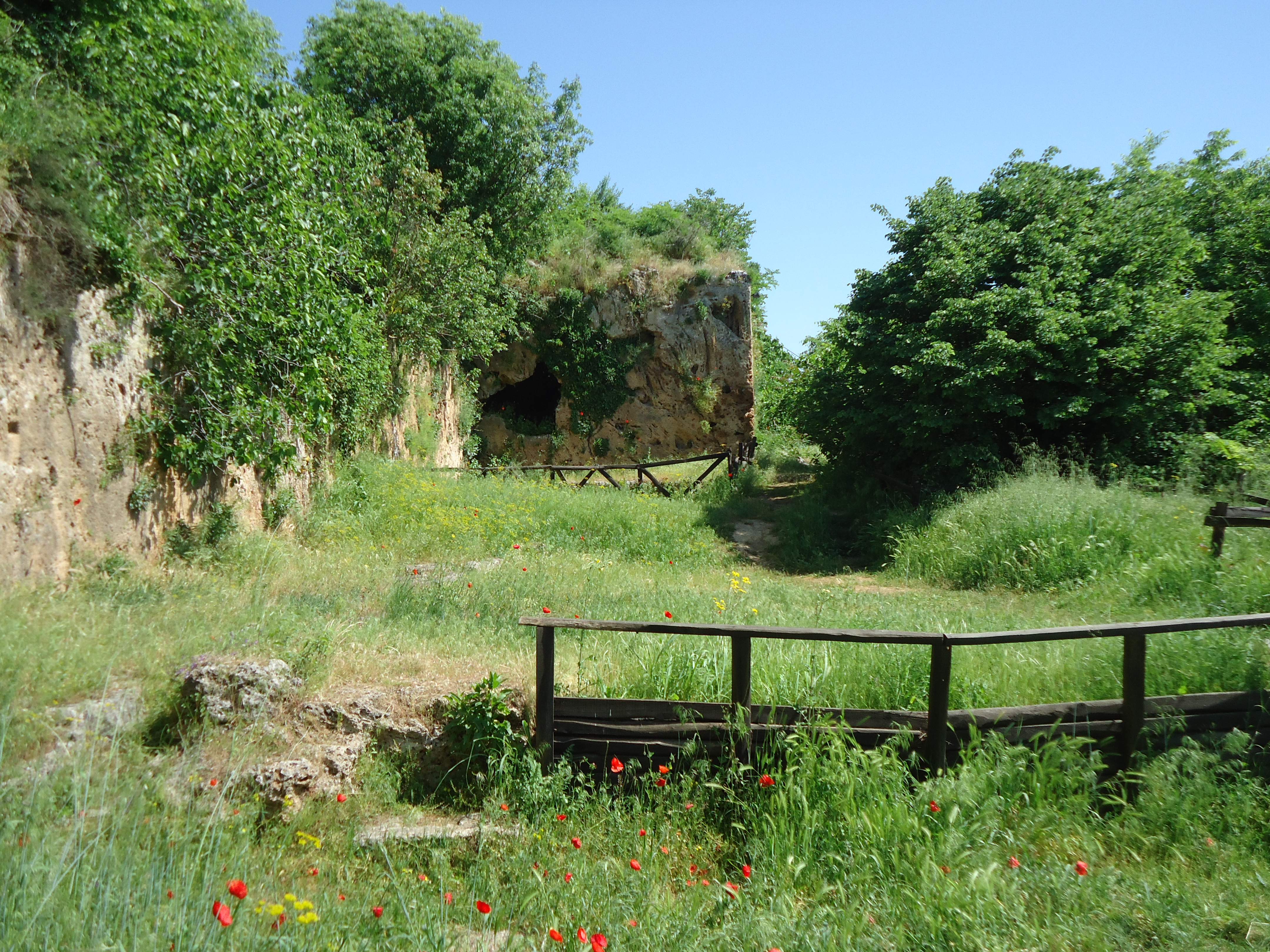 Περιπατητική Σχολή του Αριστοτέλη στη Μίεζα